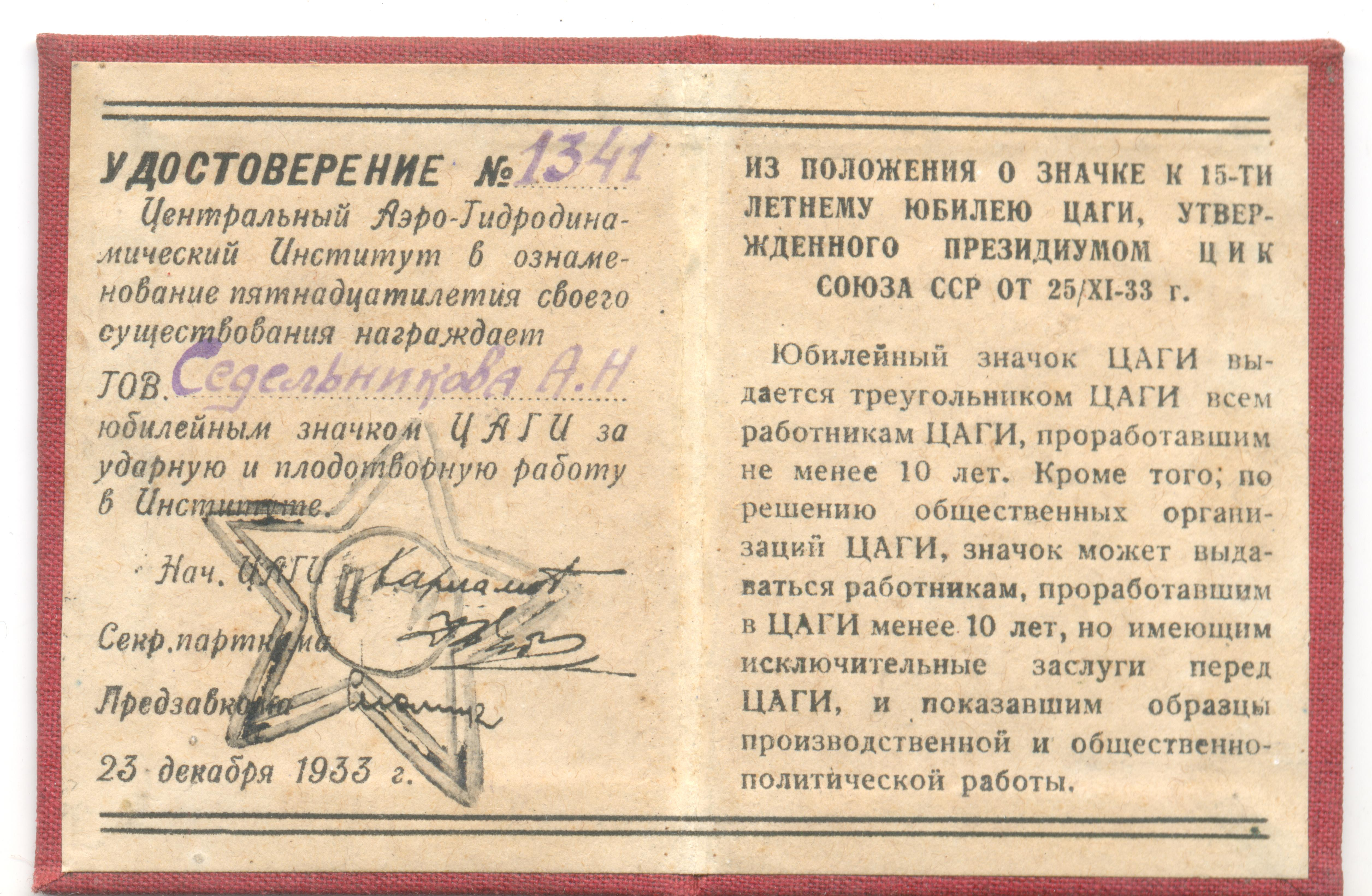 Наградная книжка Юбилейного знака "ЦАГИ" А.Н. Седельникова "За ударную и плодотворную работу в институте"